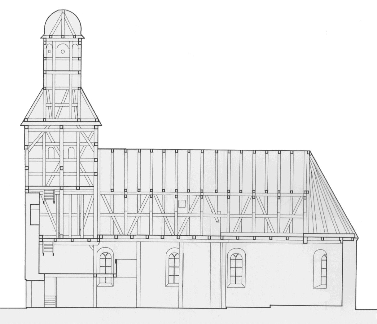 Kościół w Wojcieszycach. Przekrój podłużny